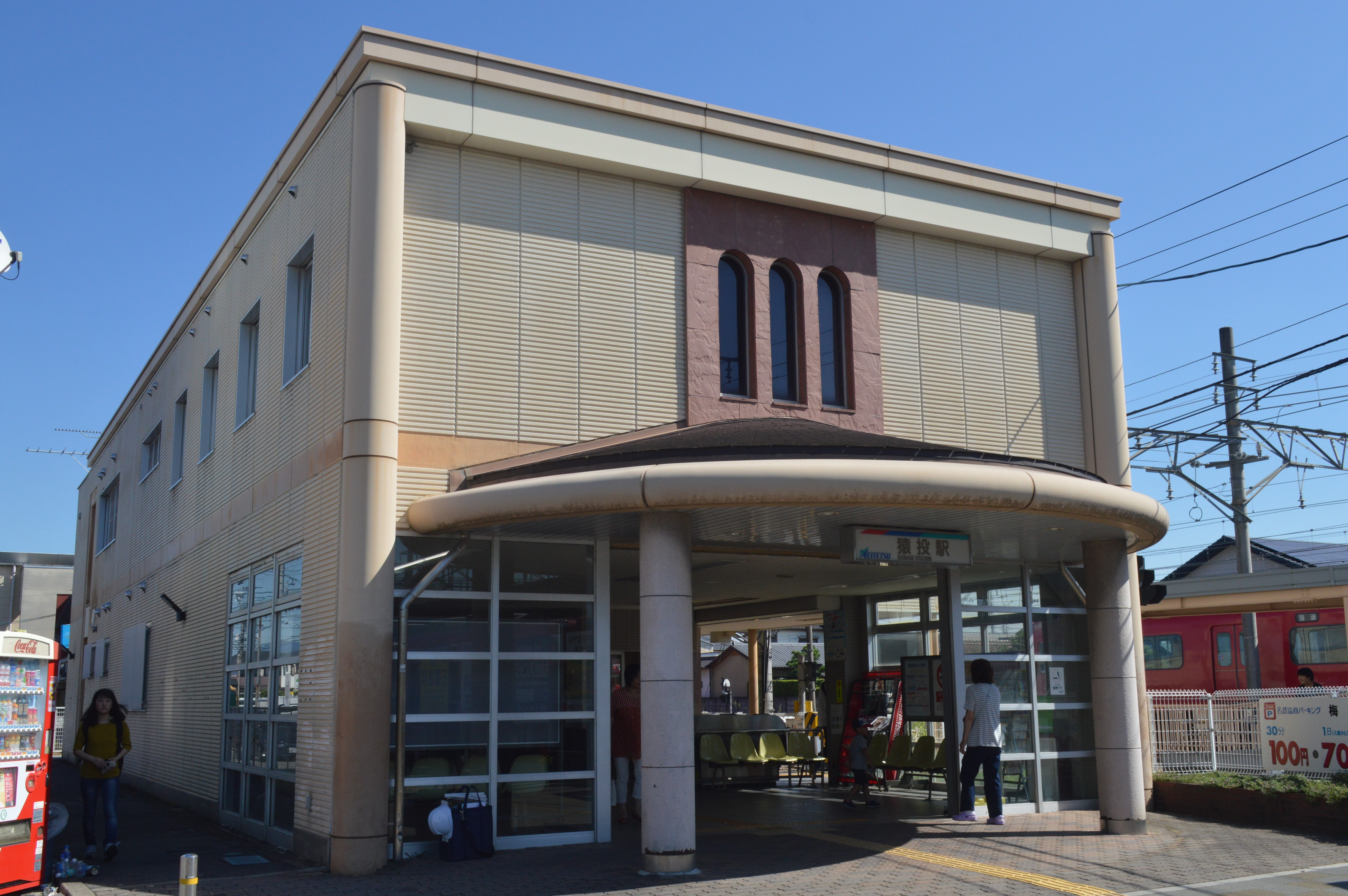 愛知県豊田市にある名鉄三河線猿投駅。